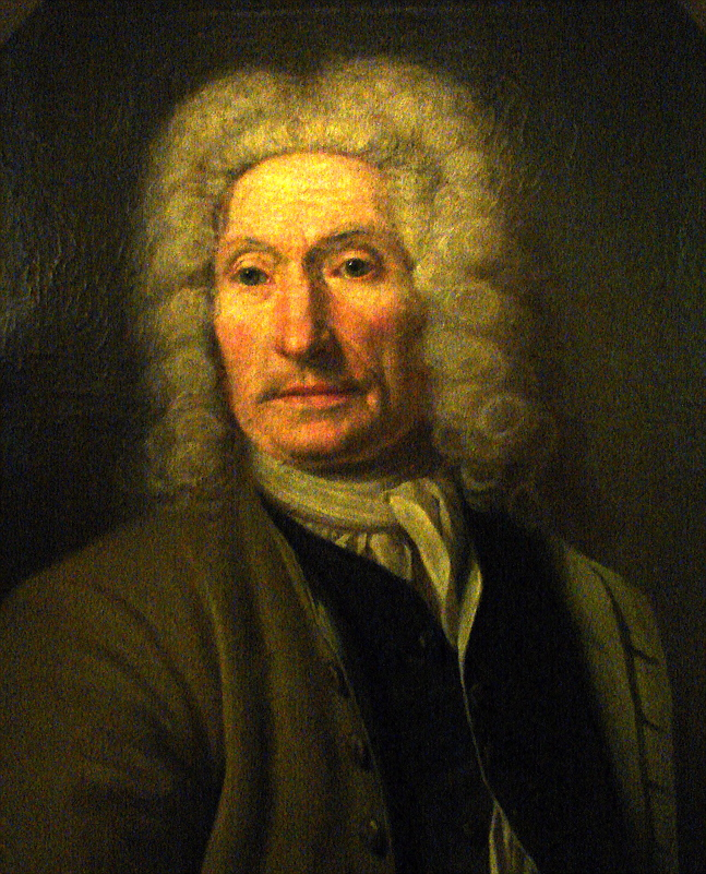 Billedskærer Magnus Berg (1666 — 1739)